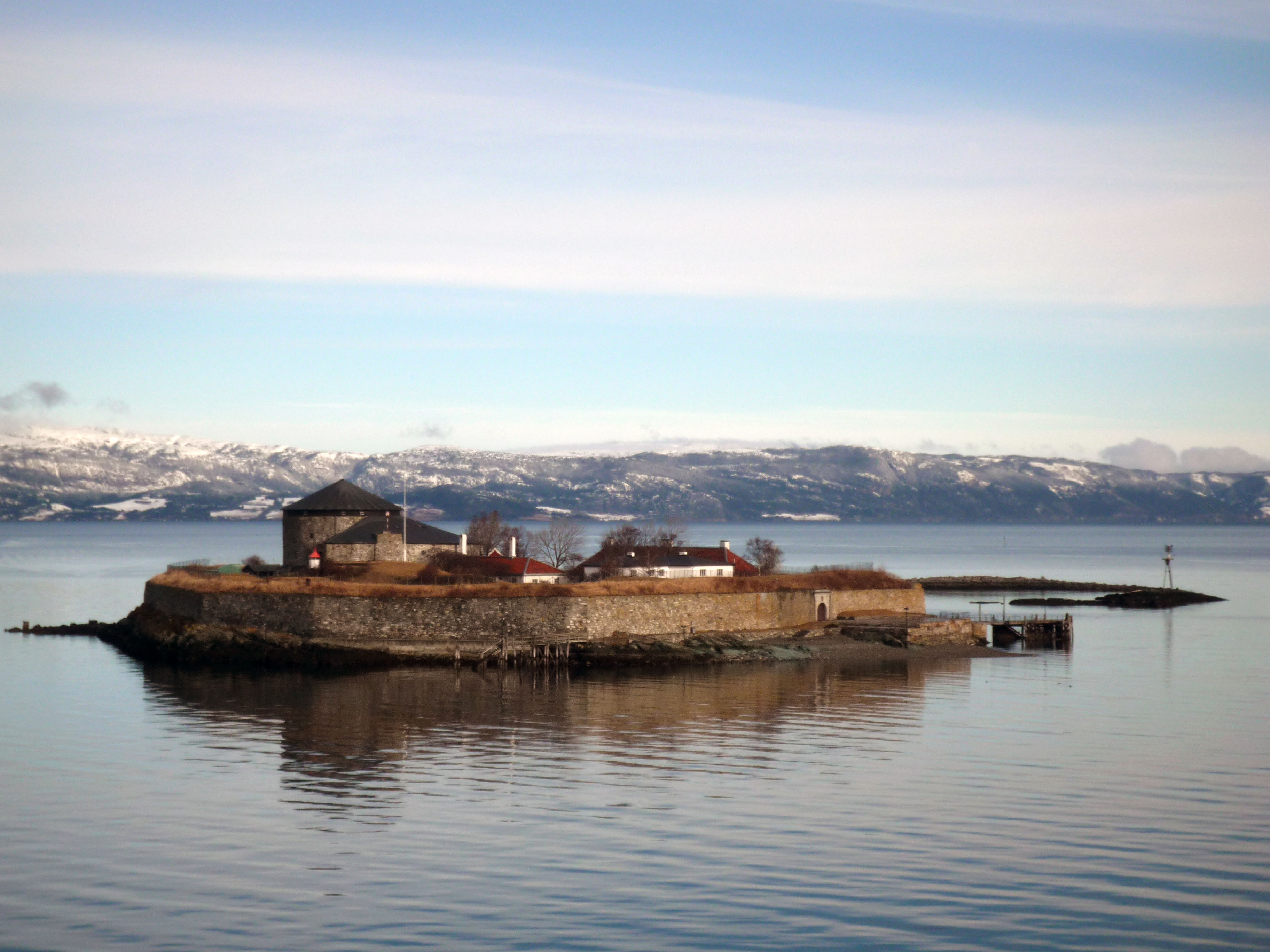 00a Tronheim Munksholmen